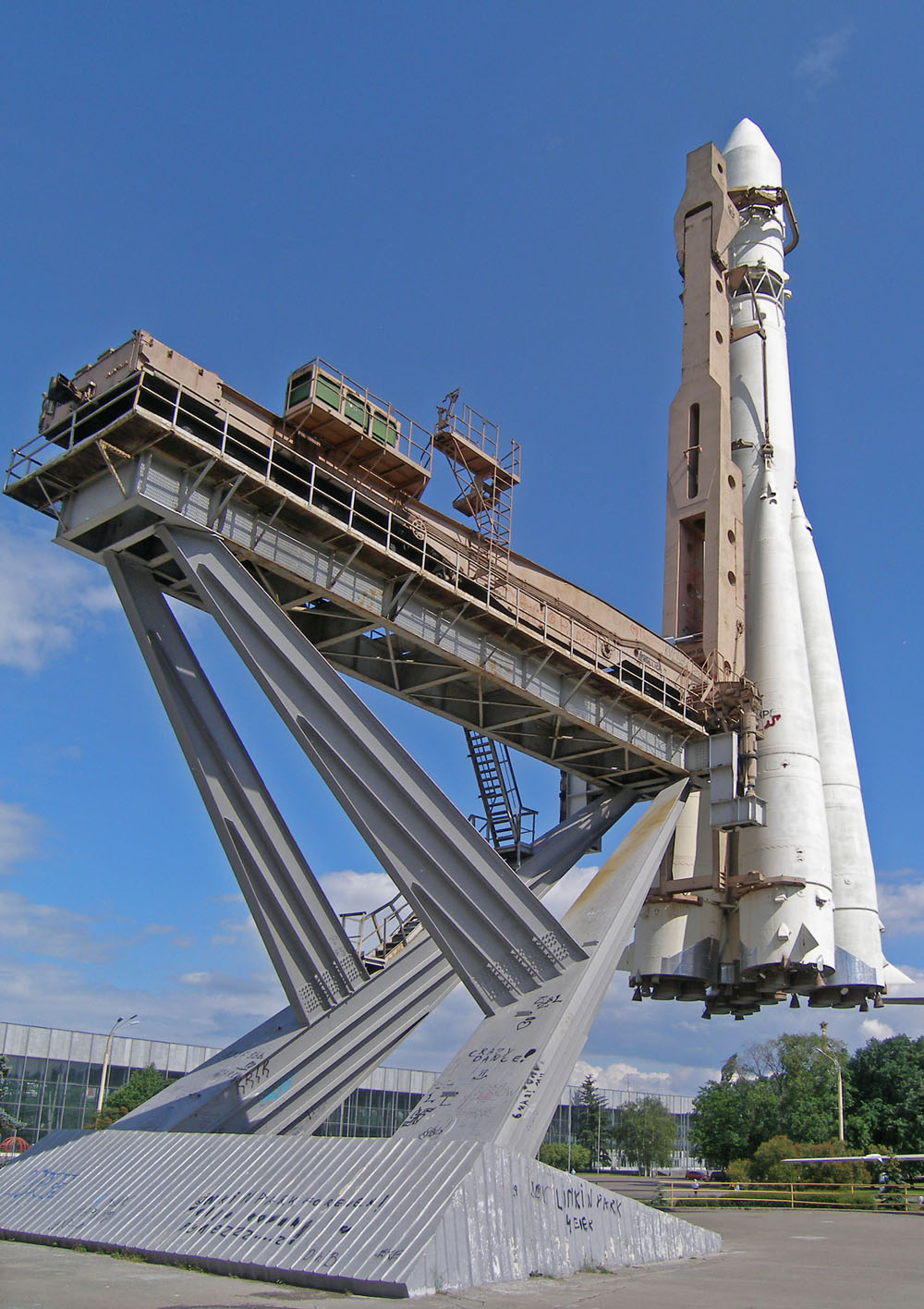 Ракета-носитель Р-7 в ВВЦ/Сarrier rocket R7 in All-Russia Exhibition Centre